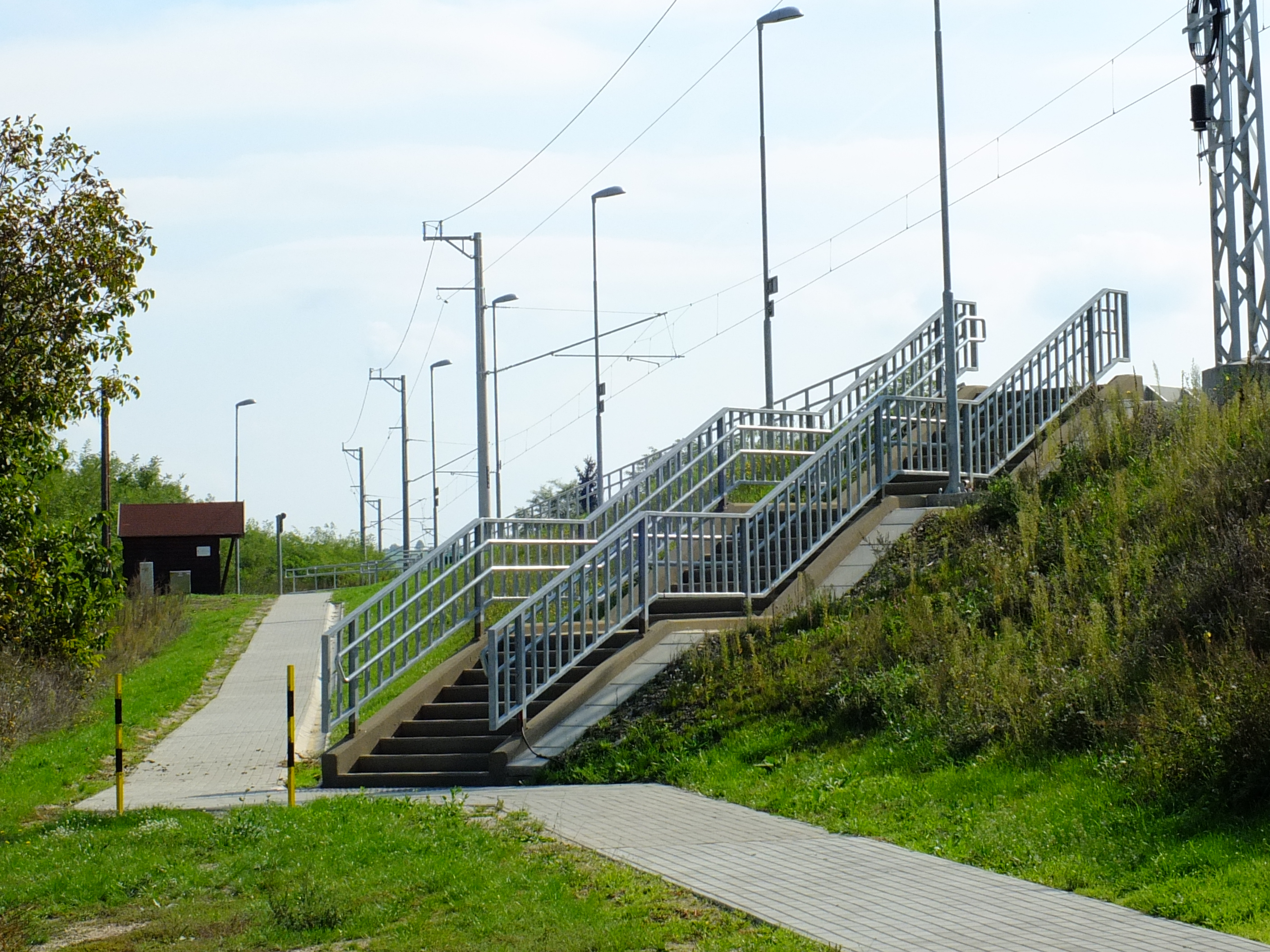 Győrvár vasúti megálló2